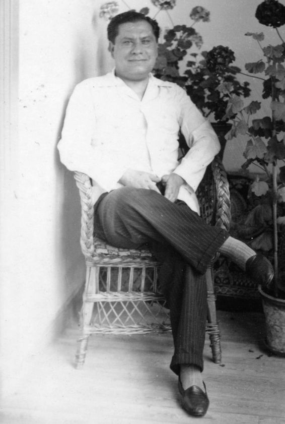 Ben-Cho-Shey, en la casa familiar de Ourense, en 1936